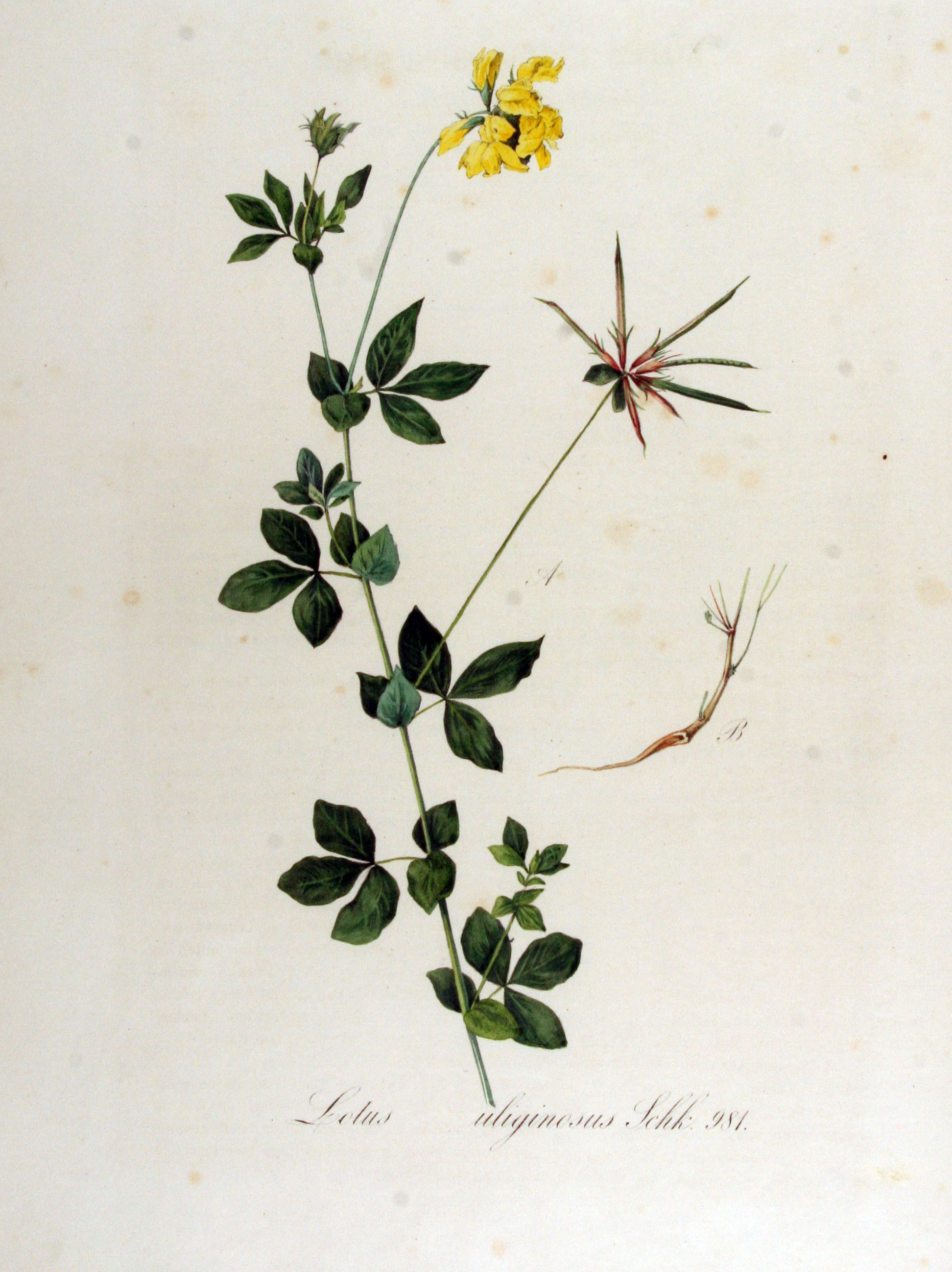 Lotus pedunculatus Cav. (Syn. Lotus uliginosus Schkuhr)